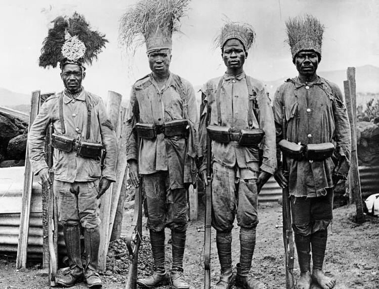 4 Mann, 9 Monate im Feld